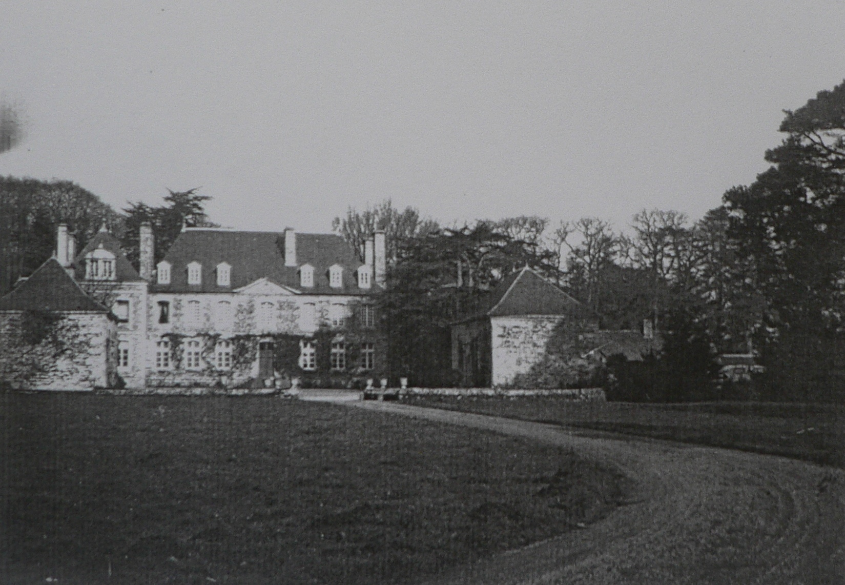 Coatilliau